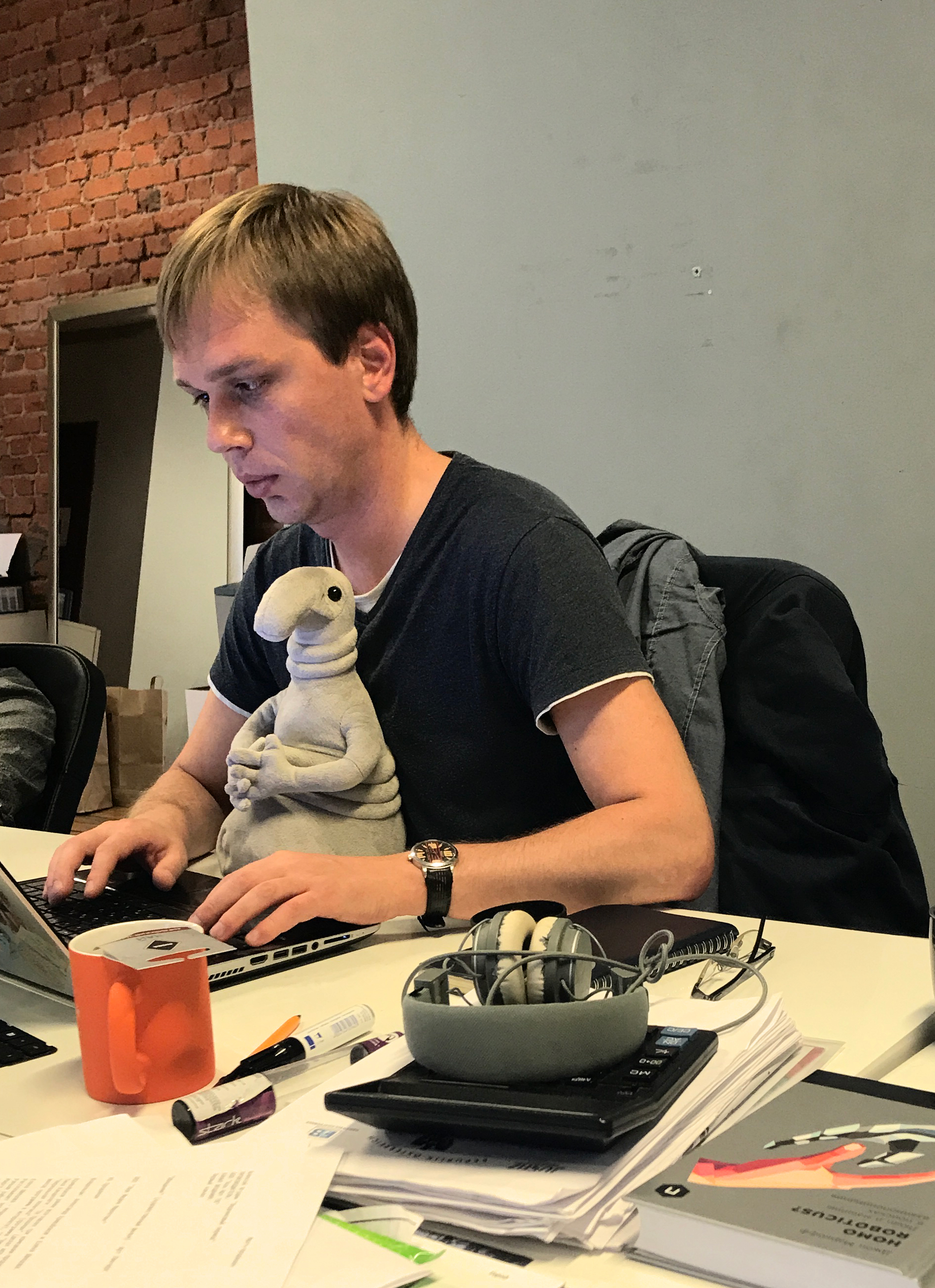 Иван Голунов. Фото Таи Бекбулатовой.